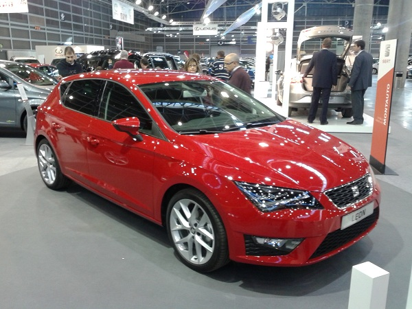 Nuevo Seat León en el Salón de Valencia